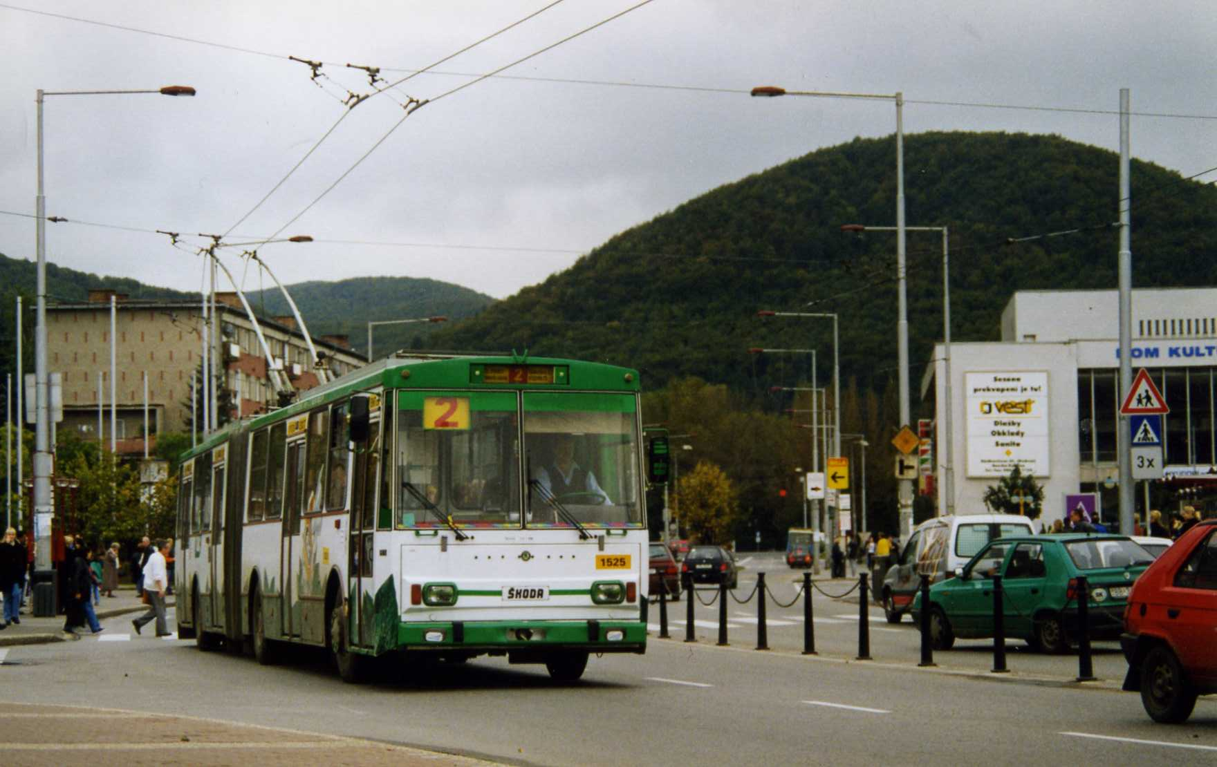 Škoda 15Tr trolleybus in Banská Bystrica, Slovakia